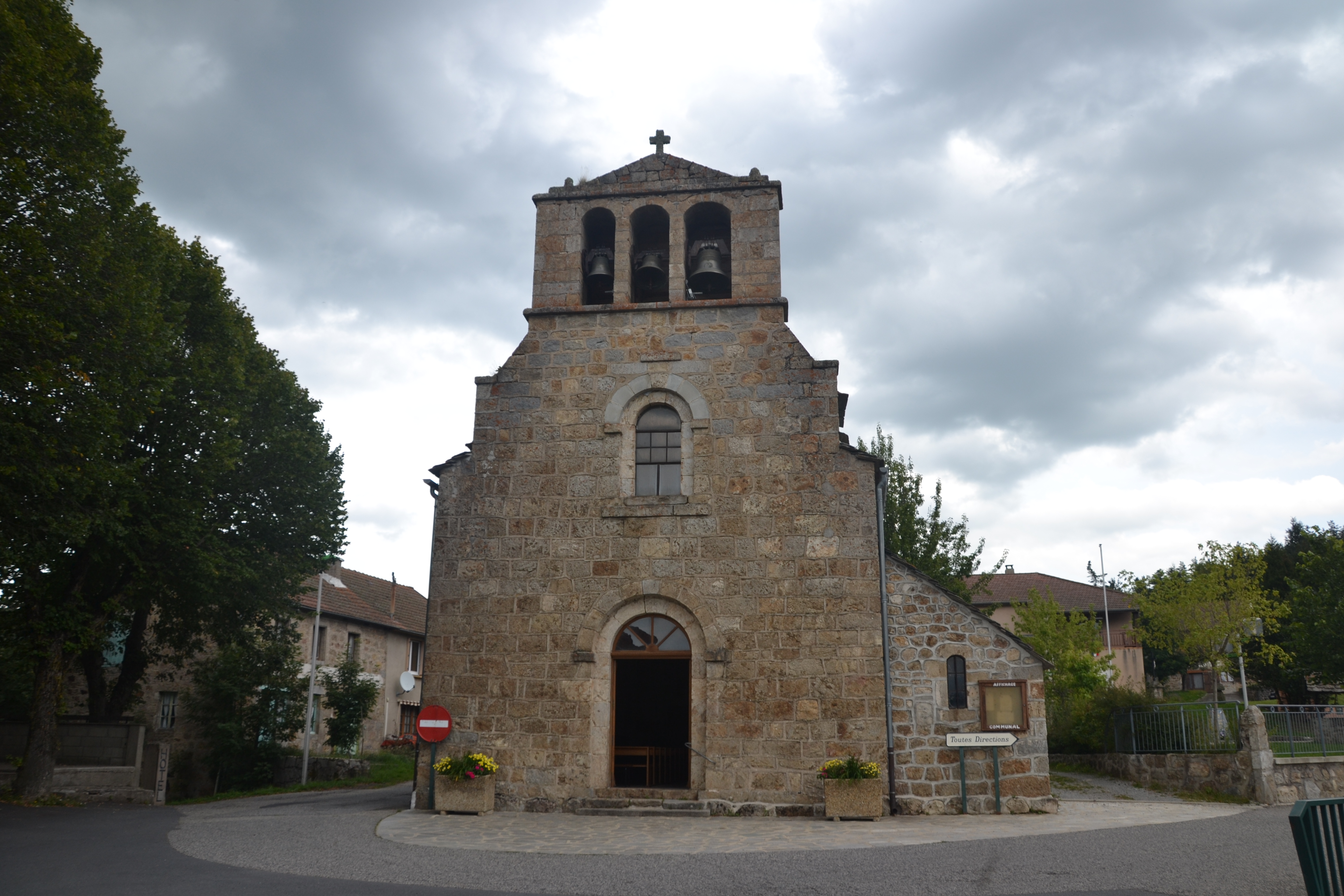 église de la commune du Lac-d'Issarlès